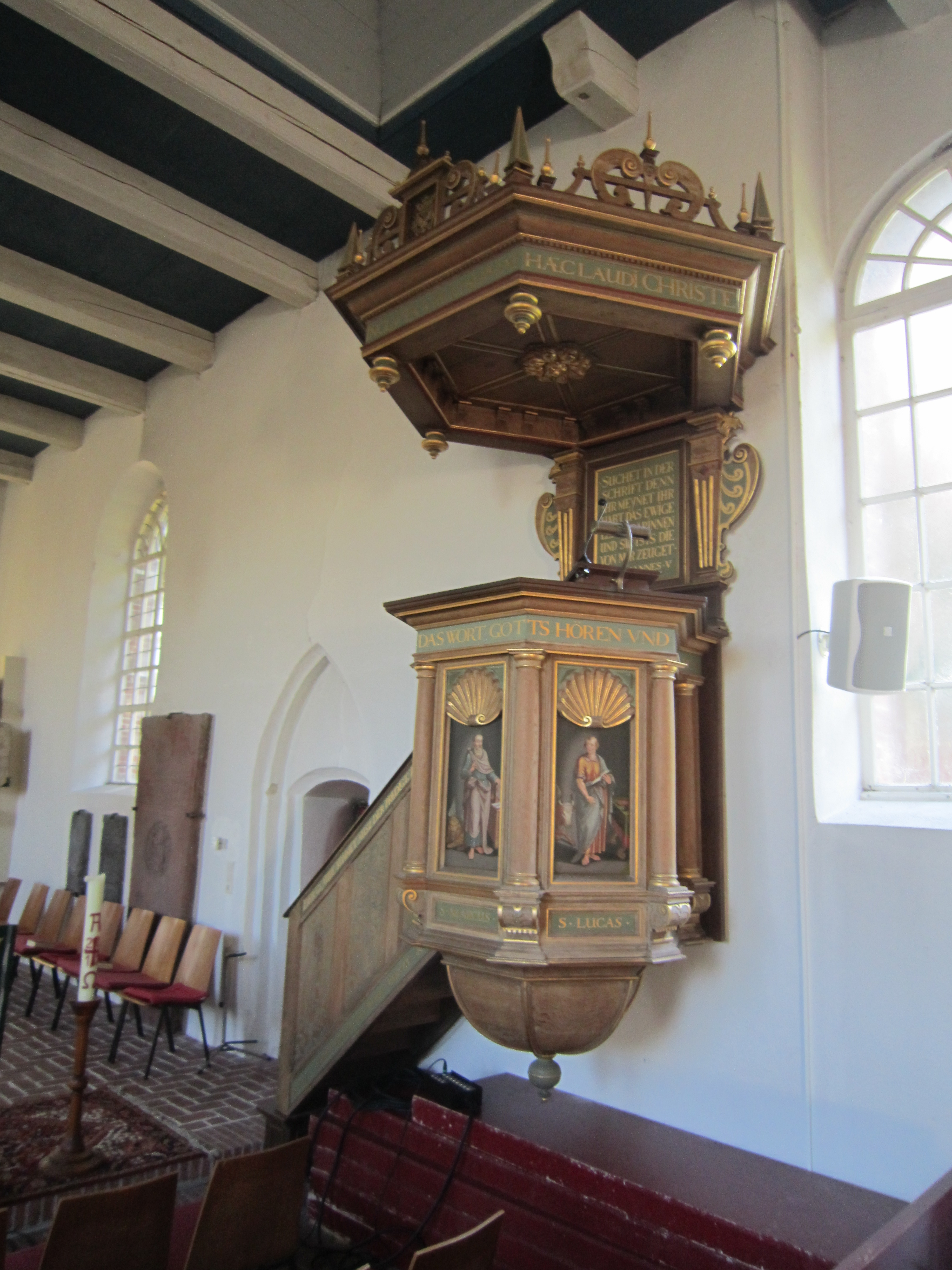 Kerk in Pewsum